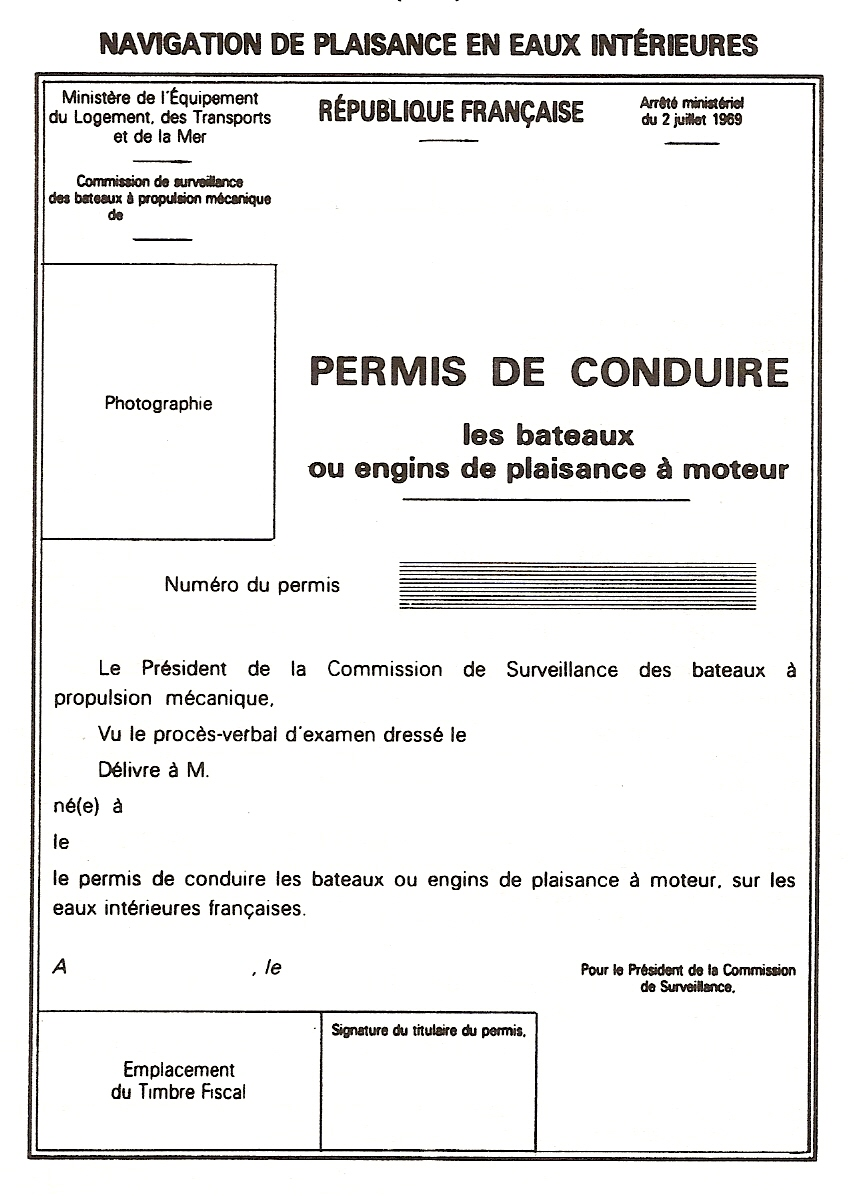 Permis de conduire les bateaux ou engins de plaisance à moteur eaux intérieures délivré de 1969 à 1992, depuis le 1 janvier 2008 équivaut au permis plaisance option eaux intérieures